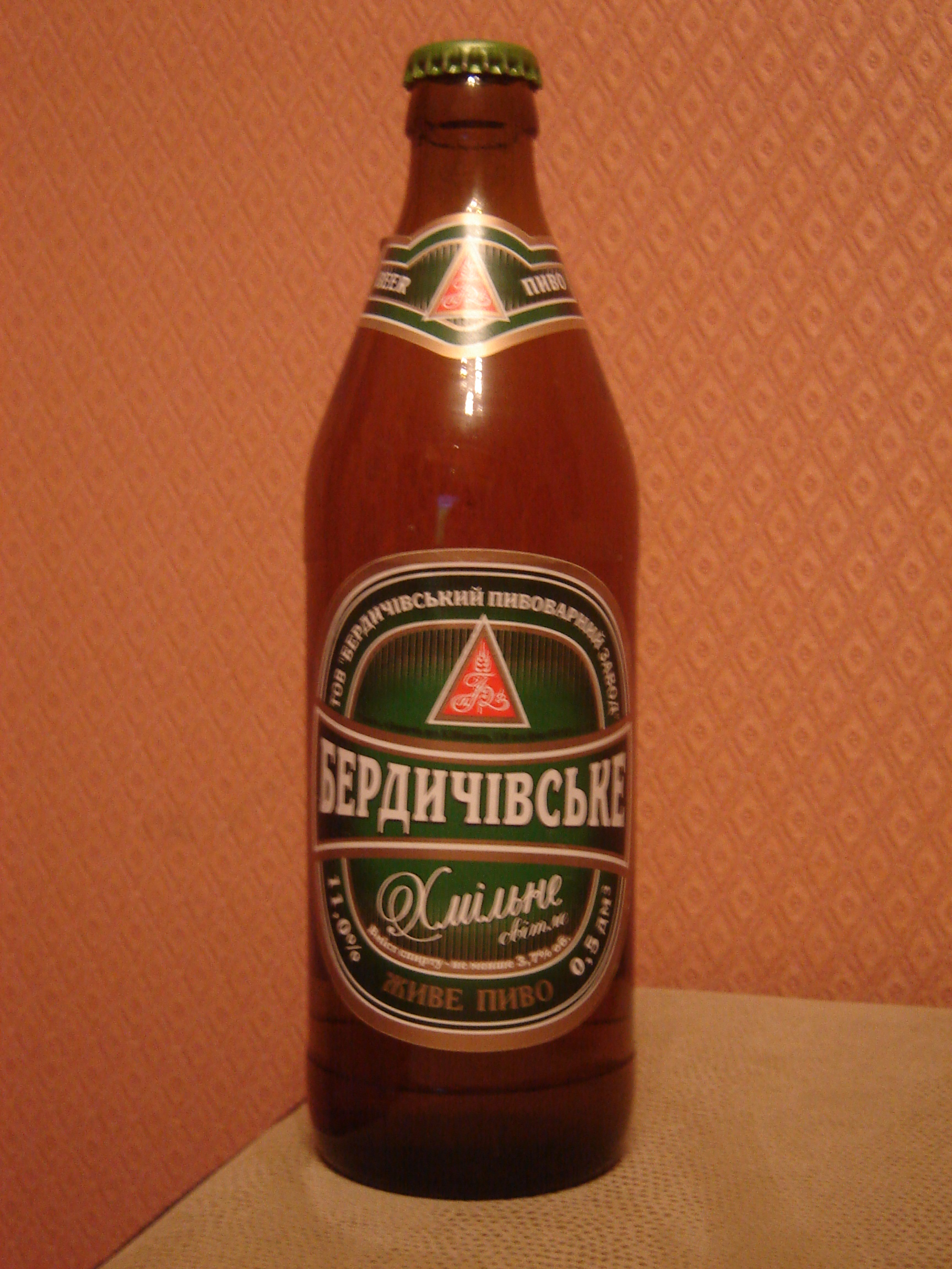 Пляшка пива "Бердичівське Хмільне": Пляшка пива "Бердичівське Хмільне"